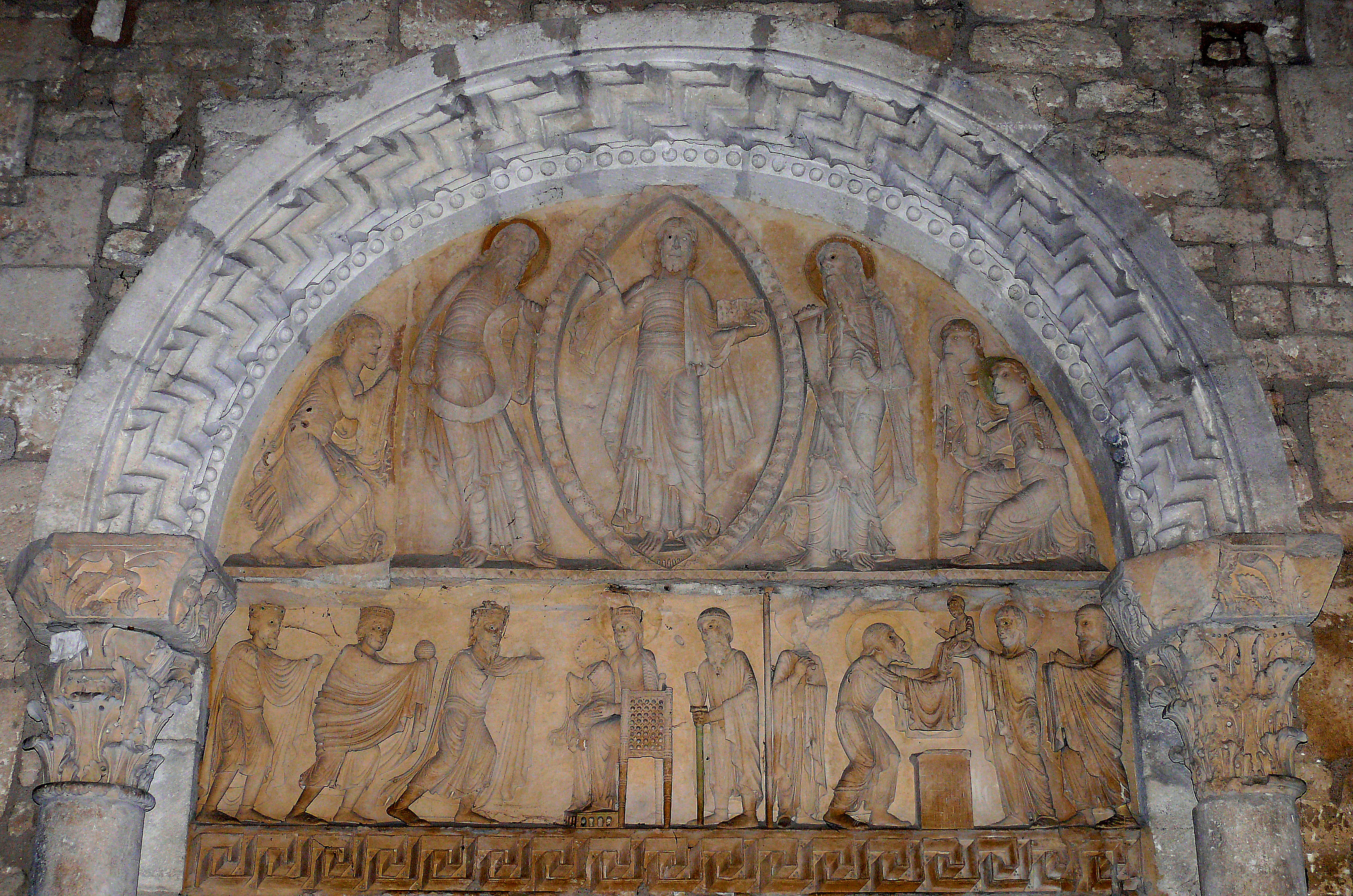 La Charité-sur-Loire - Église Notre-Dame - Tympan de l'ancienne façade de l'église déposé dans le croisillon sud du transept : le Christ de la Transfiguration, Adoration des Mages, Présentation au Temple